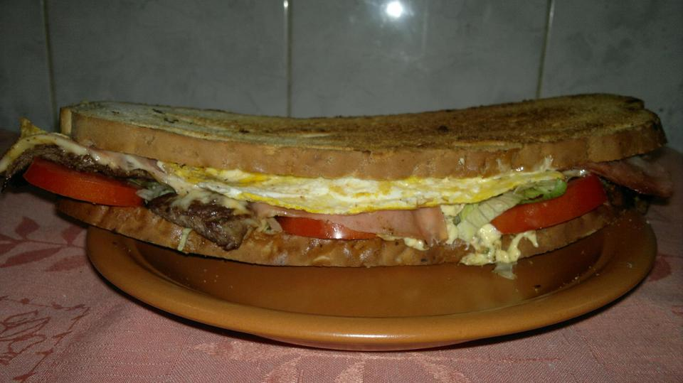 Sandwich de Lomito Mendocino